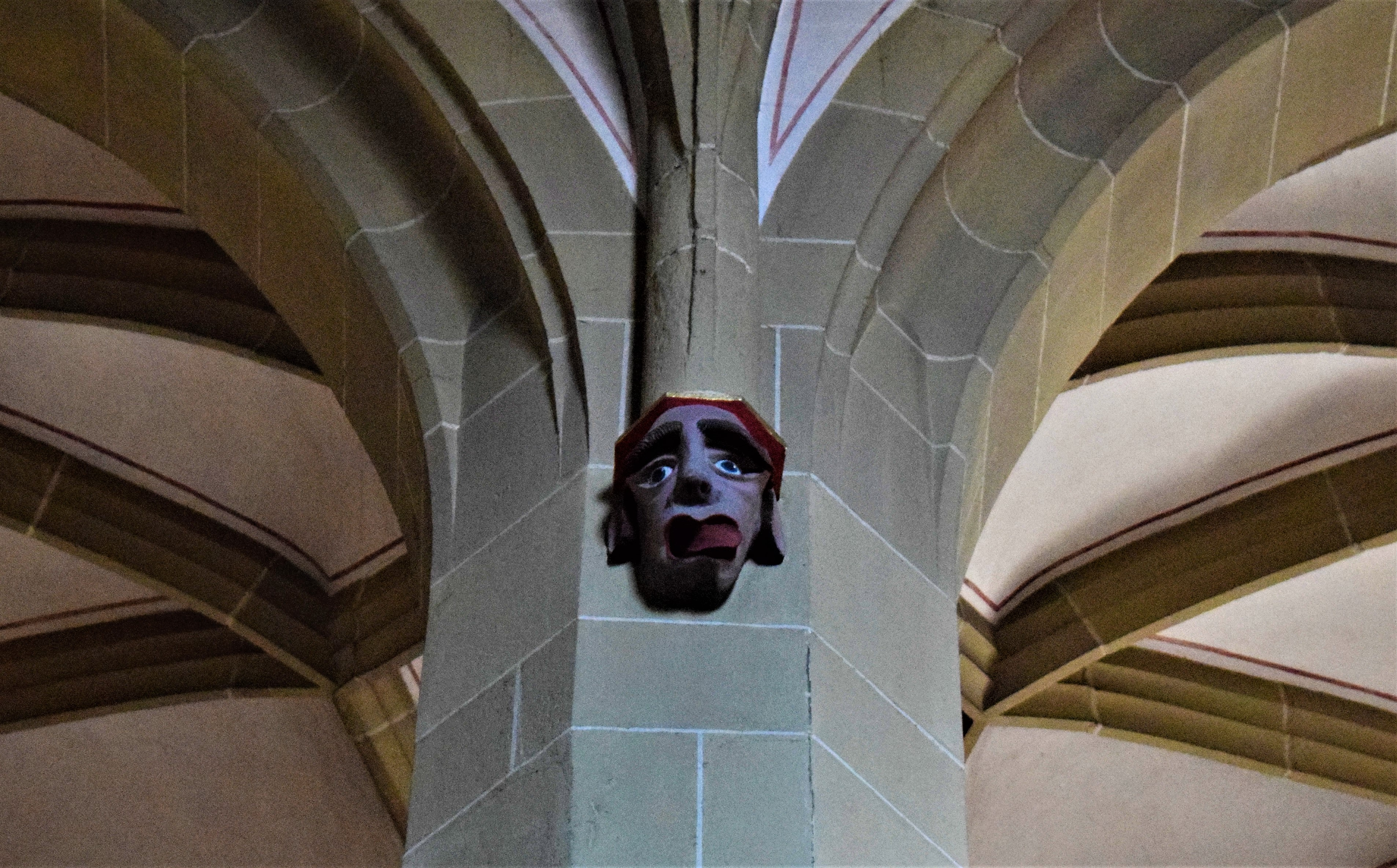 Kirche St. Johannes (Kitzingen) - Konsolkopf, Mittelschiff Südwand (Mitte 15. Jhd.): Sogenannter "Blecker" (streckt seine Zunge heraus)